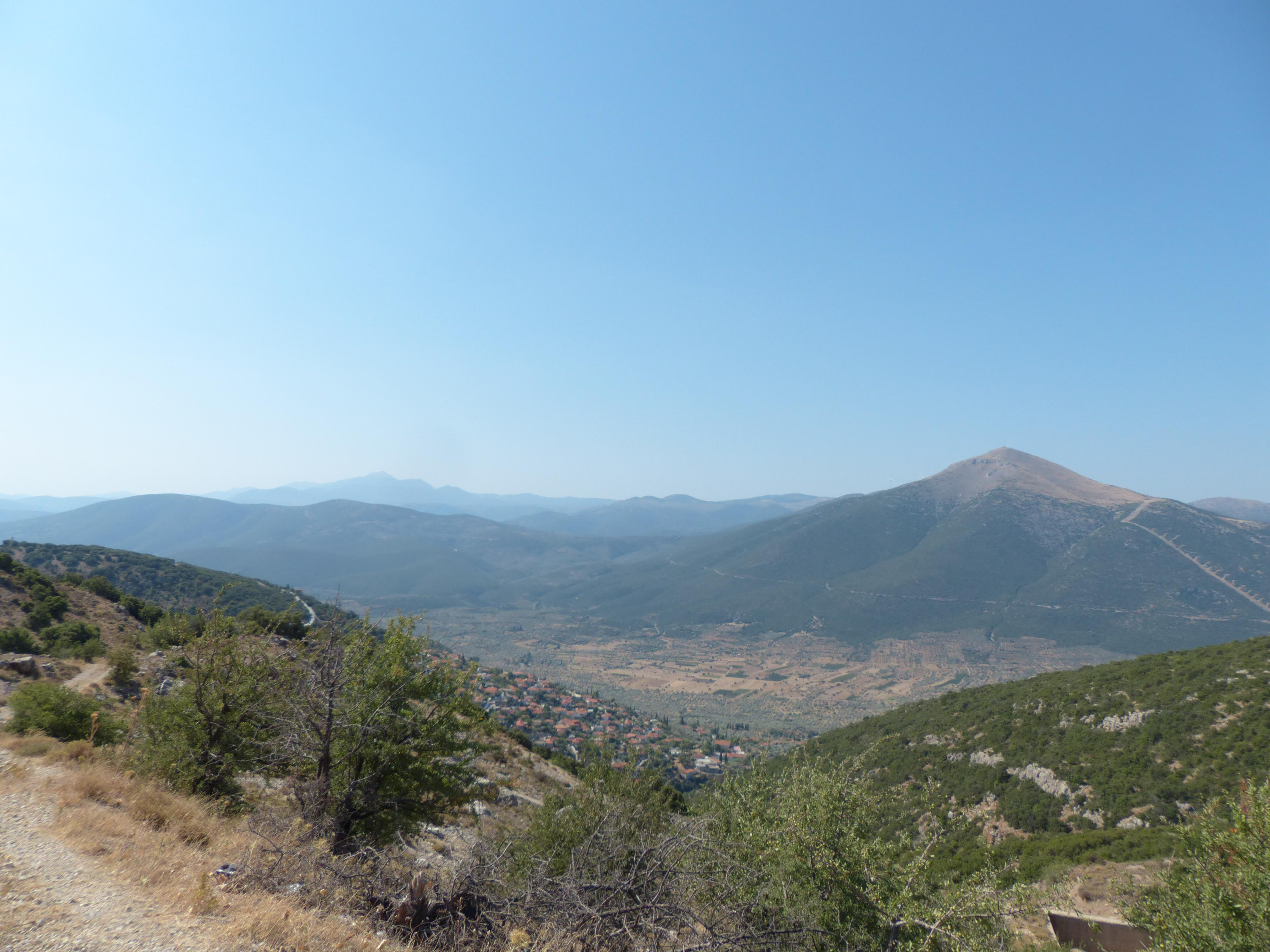 Le village d'Achladókampos (Péloponnèse, Grèce) et sa cuvette cultivée, en contrebas de la route nationale d'Argos à Tripoli. Vue prise depuis la route, au niveau de la fontaine aménagée au nord de la route. Au fond à gauche, massif du Parnon. Au fond à droite, le mont Parthénion, qui forme la limite entre l'Argolide et l'Arcadie.